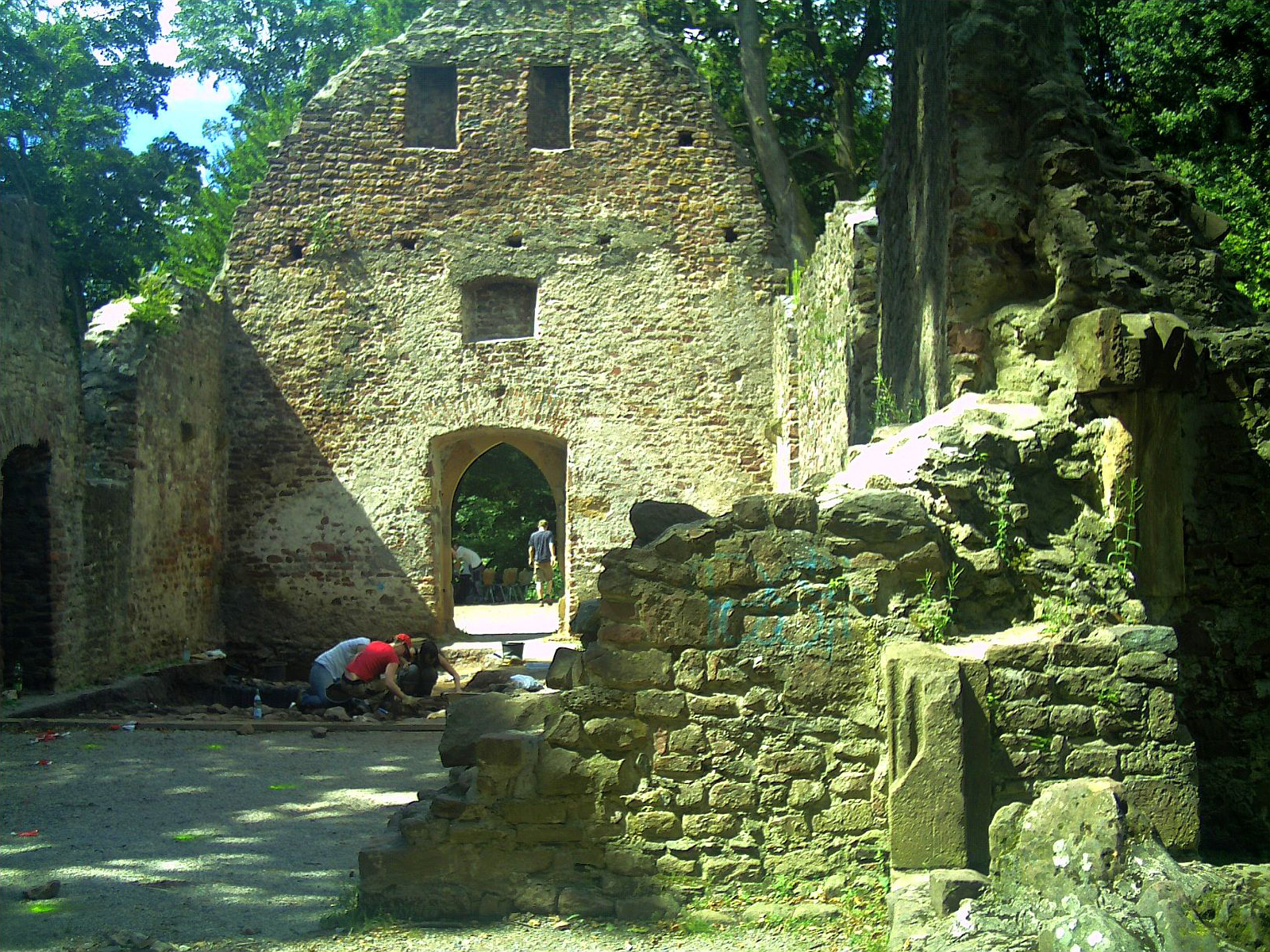 Ausgrabung der St. Severinskapelle